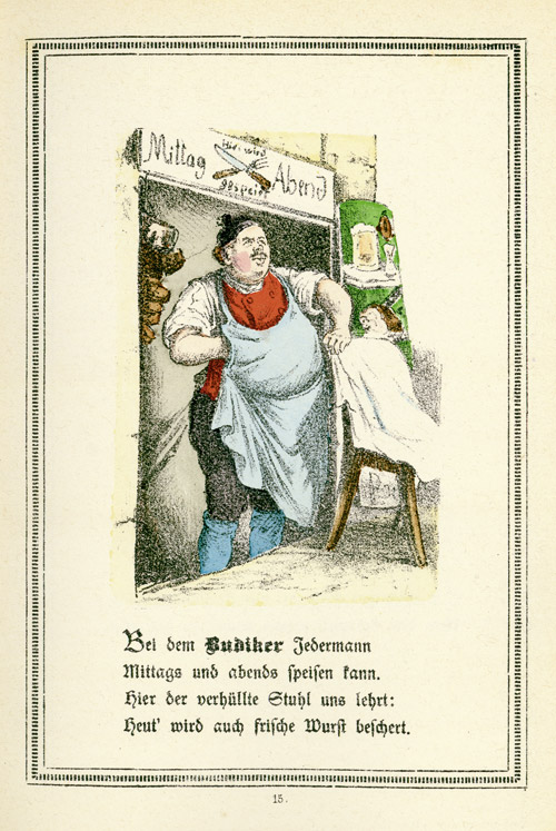 Budiker, aus: Berliner Kinder. Bilder aus der Kaiserstadt. Berlin, Alex. Kiessling, ca. 1870er